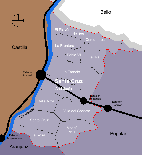 mapa de la división barrial de la comuna Santa Cruz. Medellín, Colombia.